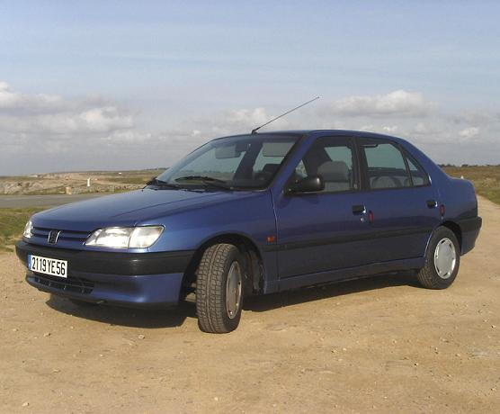 Peugeot 306 4 portes (Sedan)